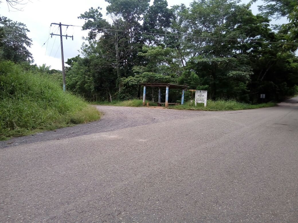 Paso del Tigre, la entrada a Juan de la luz Enriquez Jesus Carranza Veracruz